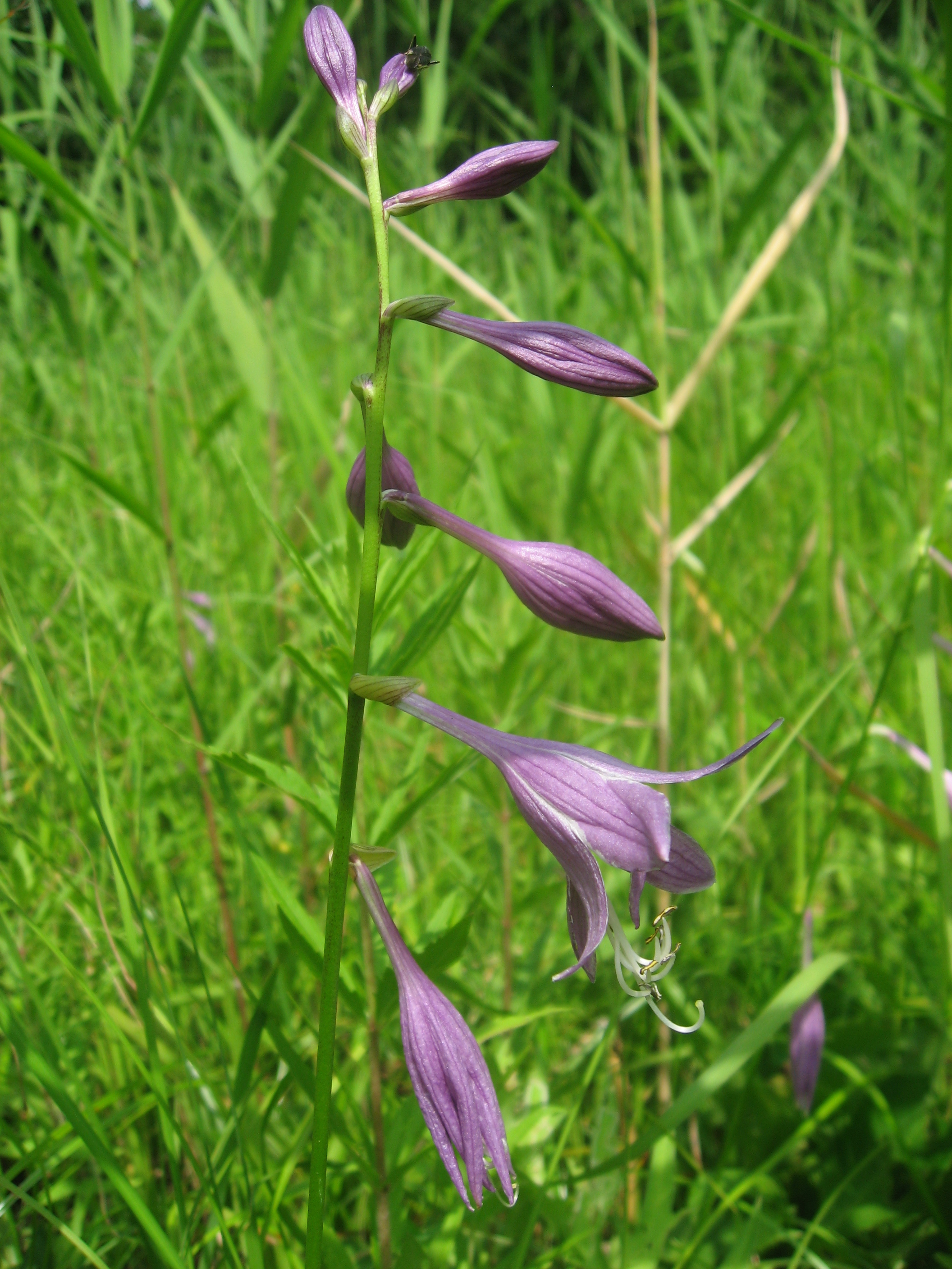 コバギボウシ Hosta_albo-marginata